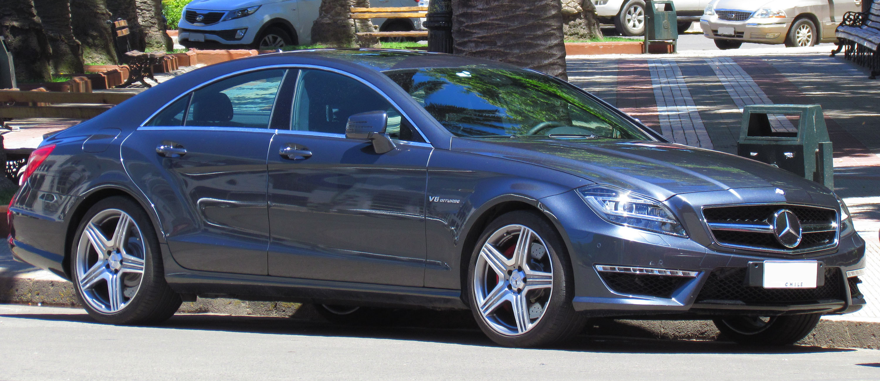 Mercedes Benz CLS 63 AMG